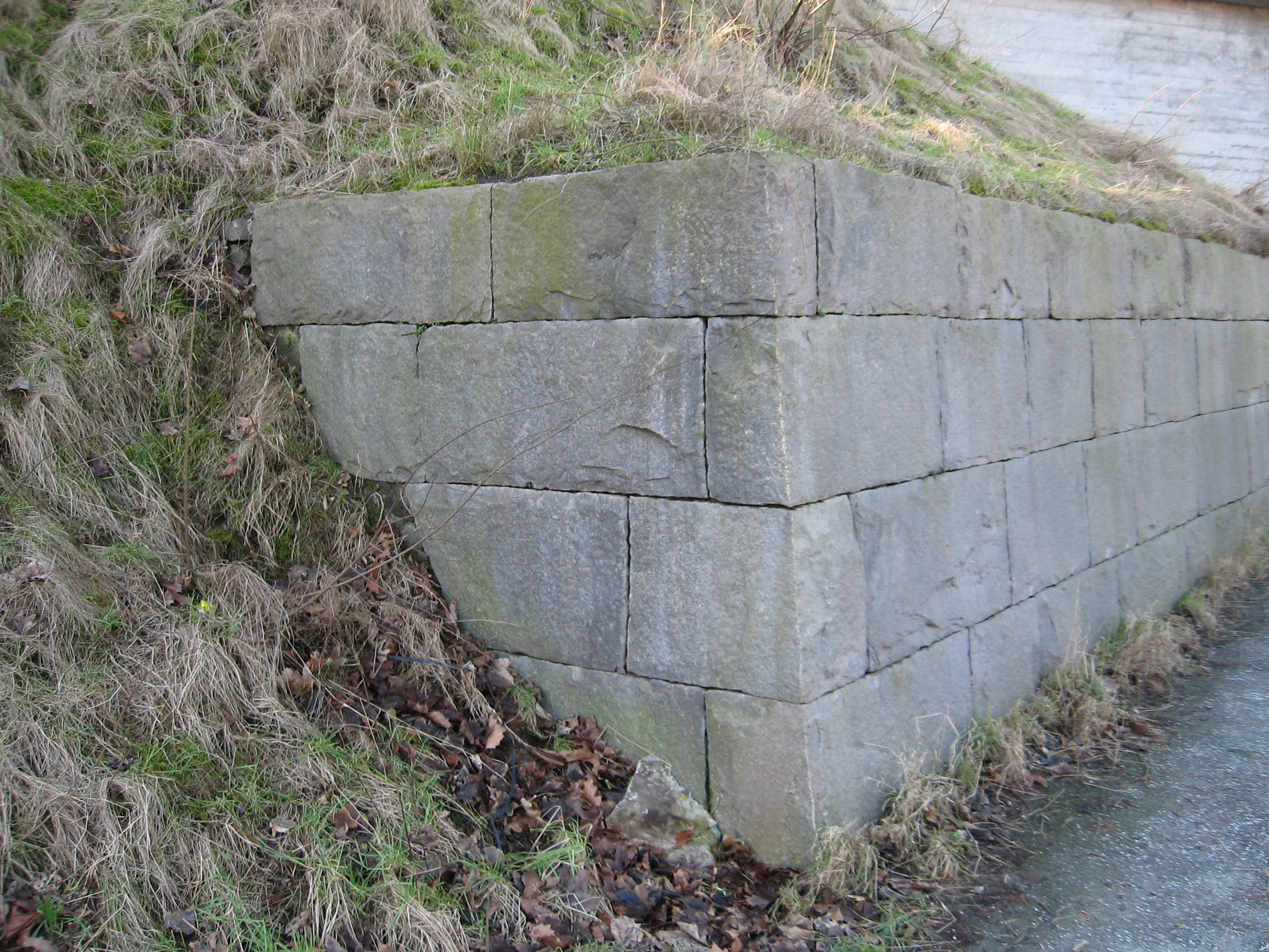 Järnvägsbro i Lund. En nitad stålbalkbro uppförd 1936 för Lund-Trelleborgs järnvägs räkning som går över Ringvägen, mellan Stadsparken och Klostergården. Stödmur vid upplag.